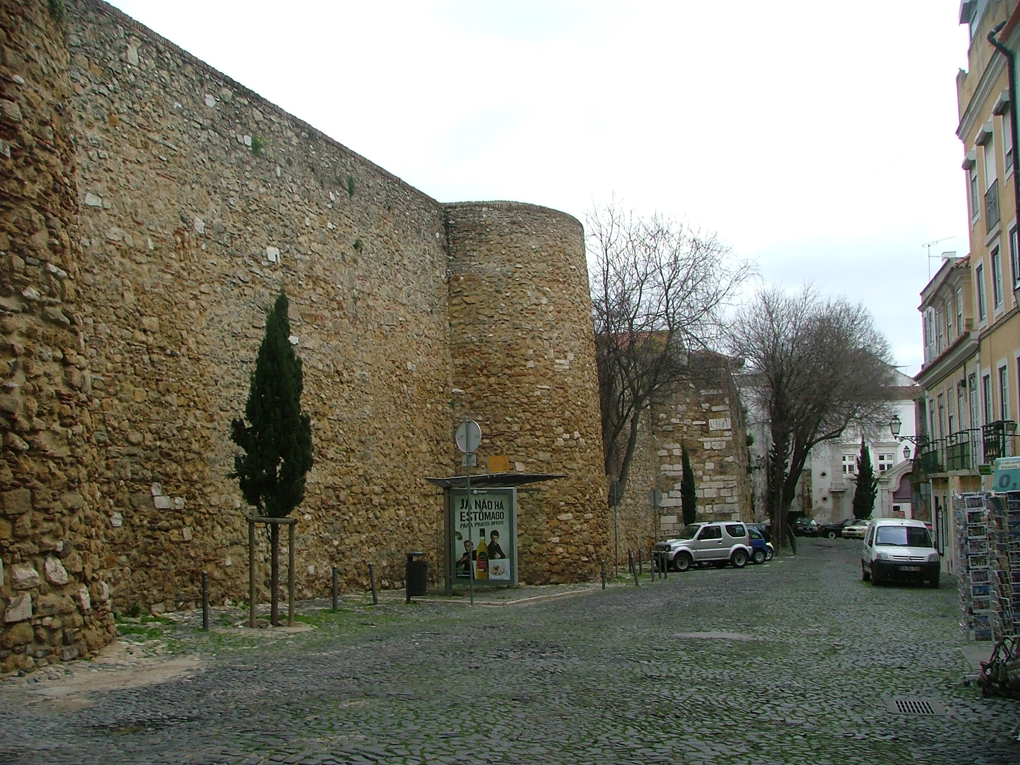 Castelo de São Jorge, Lisbon, Portugal